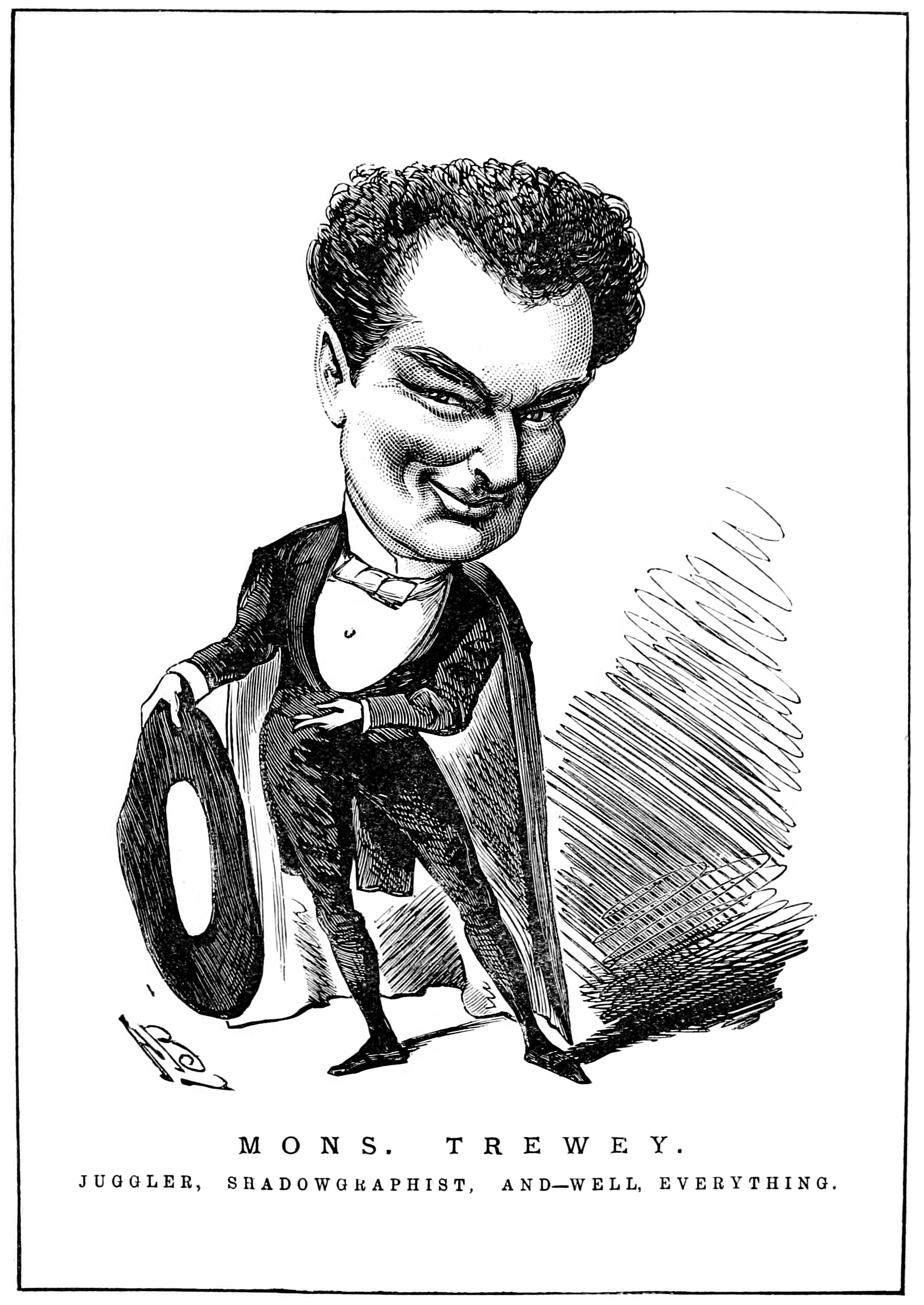 Portrait-charge du célèbre artiste ombromane Félicien Trewey.